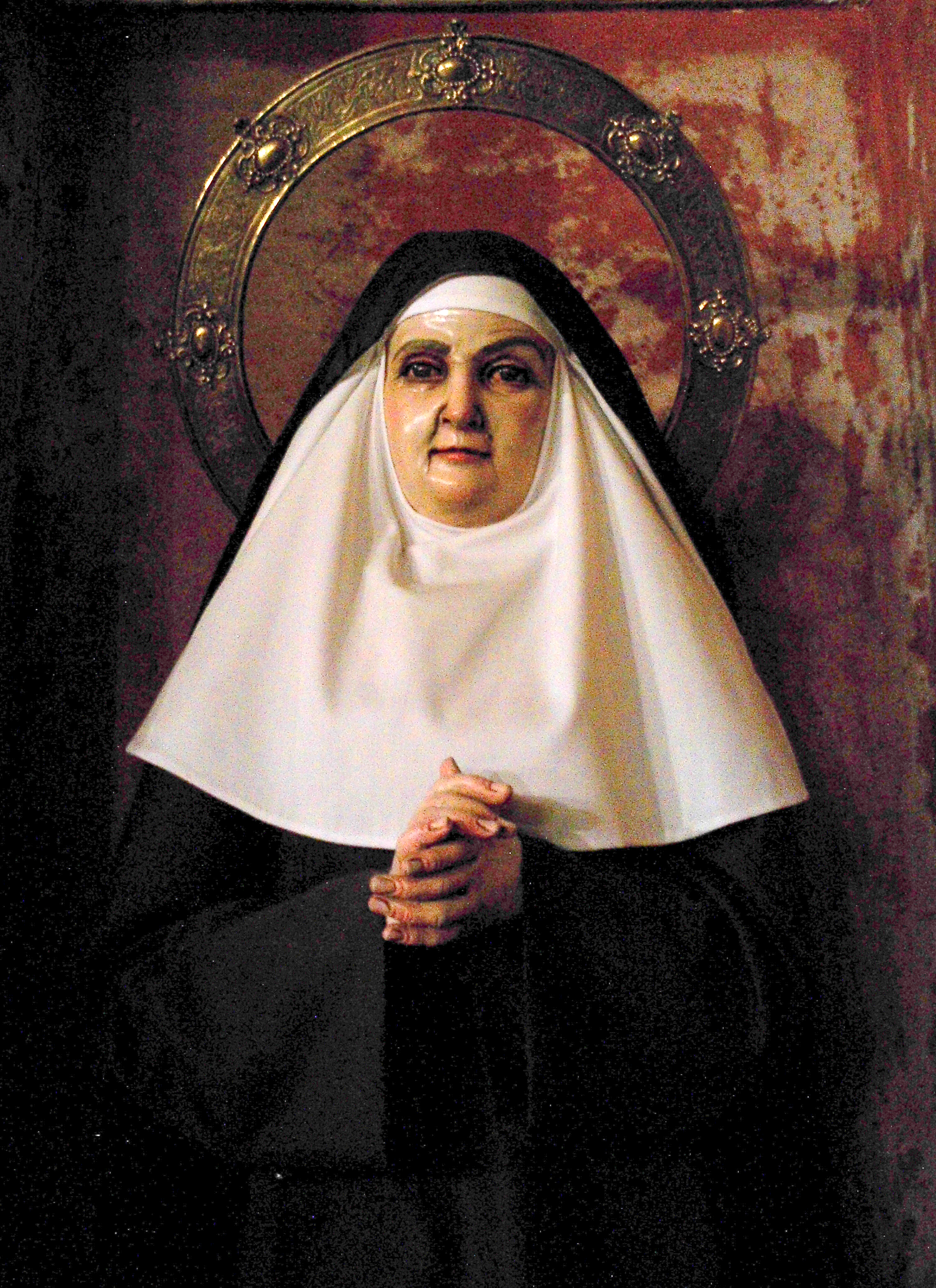 Escultura de Santa Ángela de la Cruz. Iglesia de Santa Ana, Sevilla, Andalucía, España.